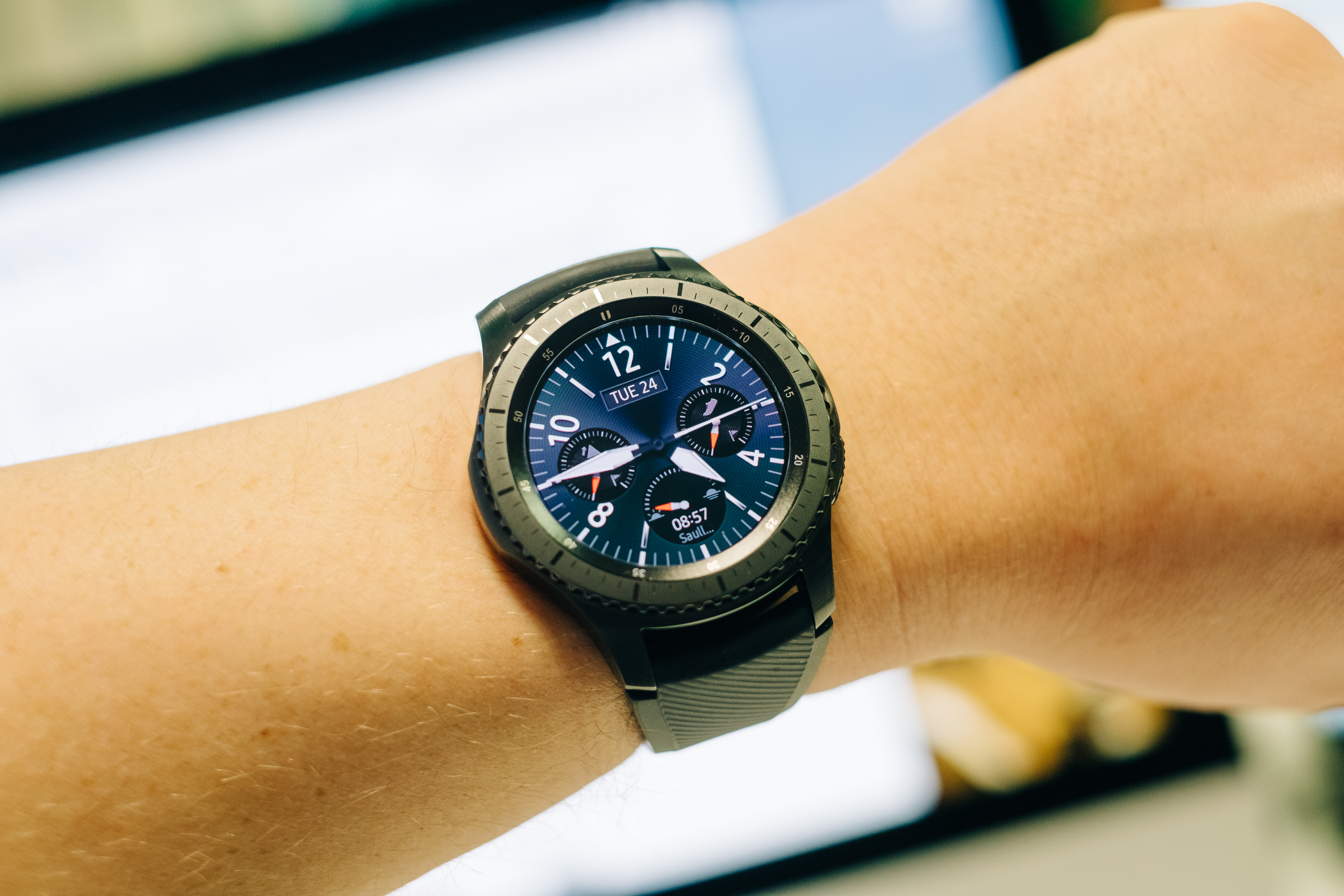 Samsung Gear 3 Frontier